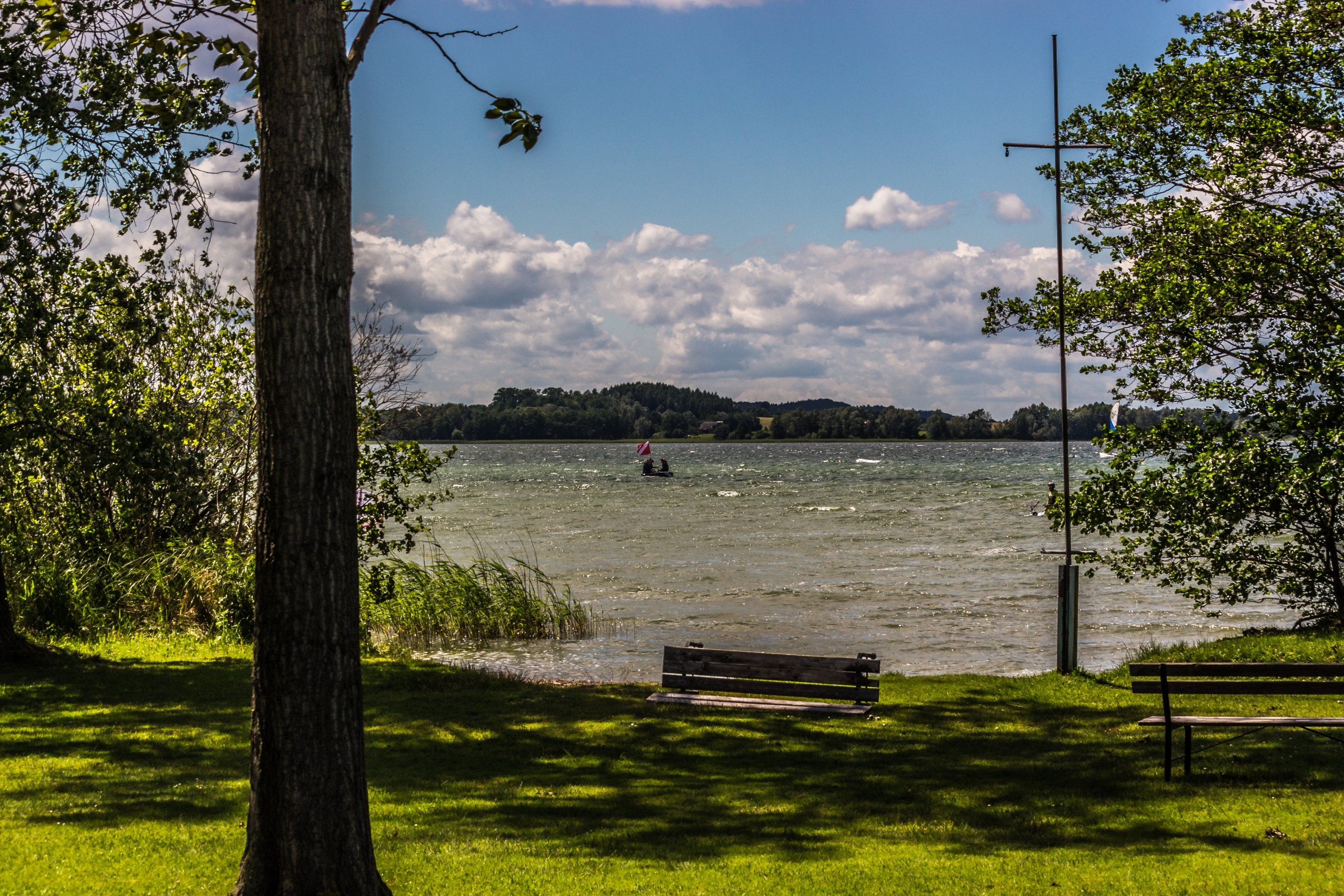 Parsteinsee am Campingplatz Parstein